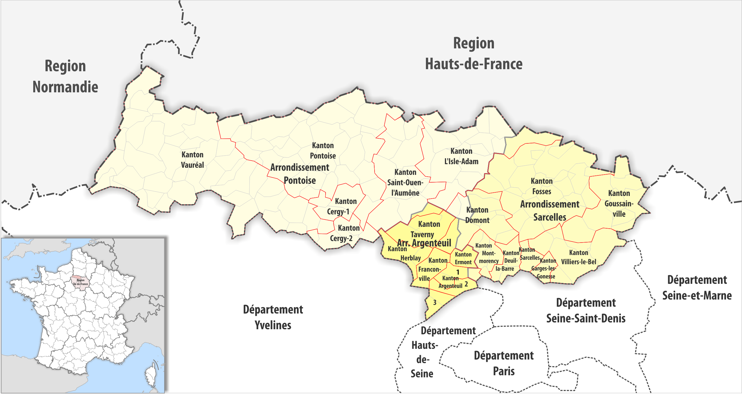 Gemeinden, Kantone und Arrondissemente im Departement Val-d’Oise